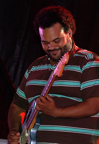 Carlos Jean en un concierto en Boiro en 2007